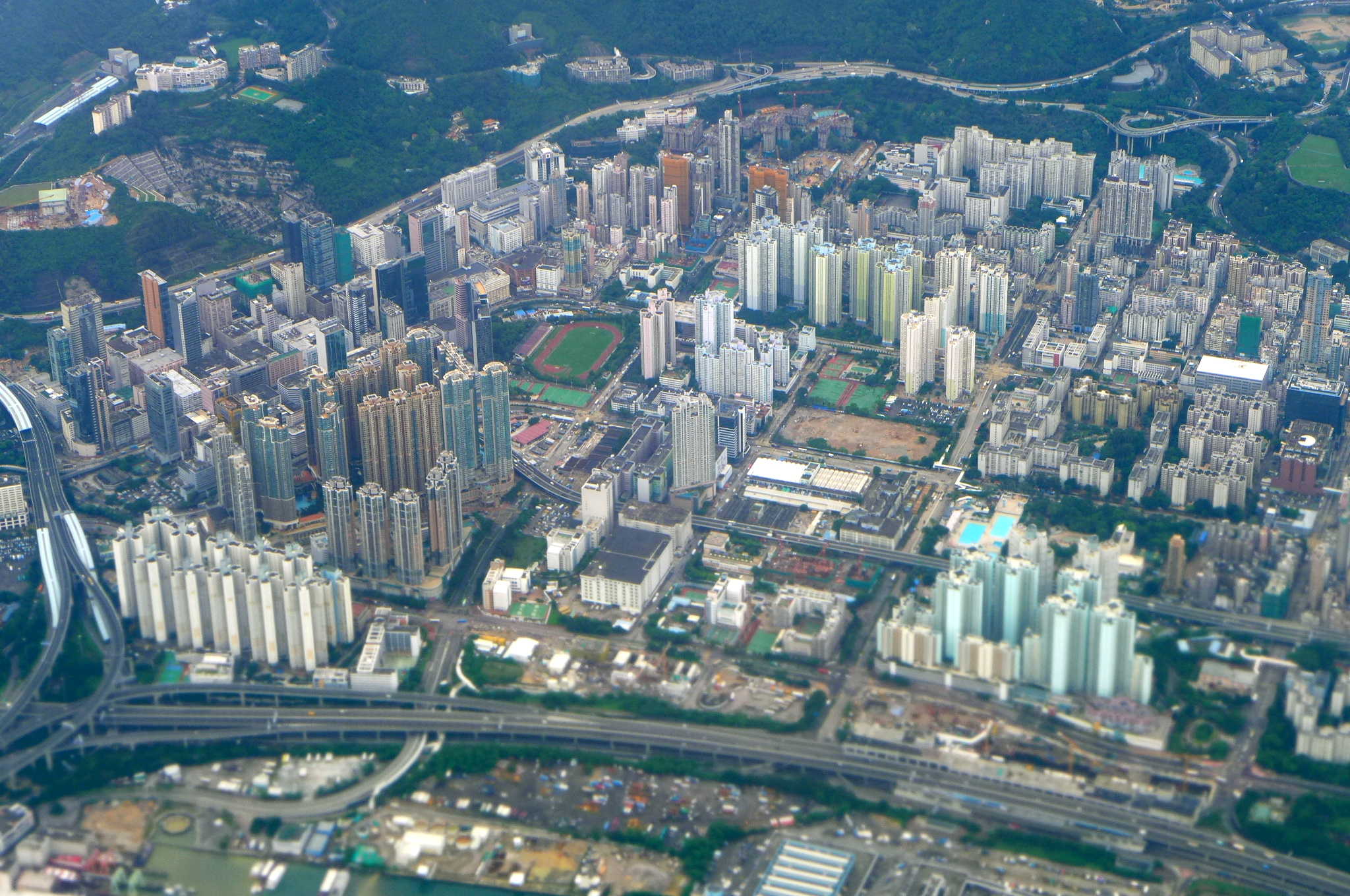 Cheung Sha Wan